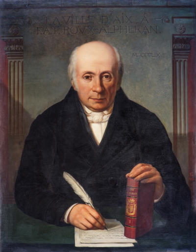 Portait de l'historien Ambroise Roux-Alphéran